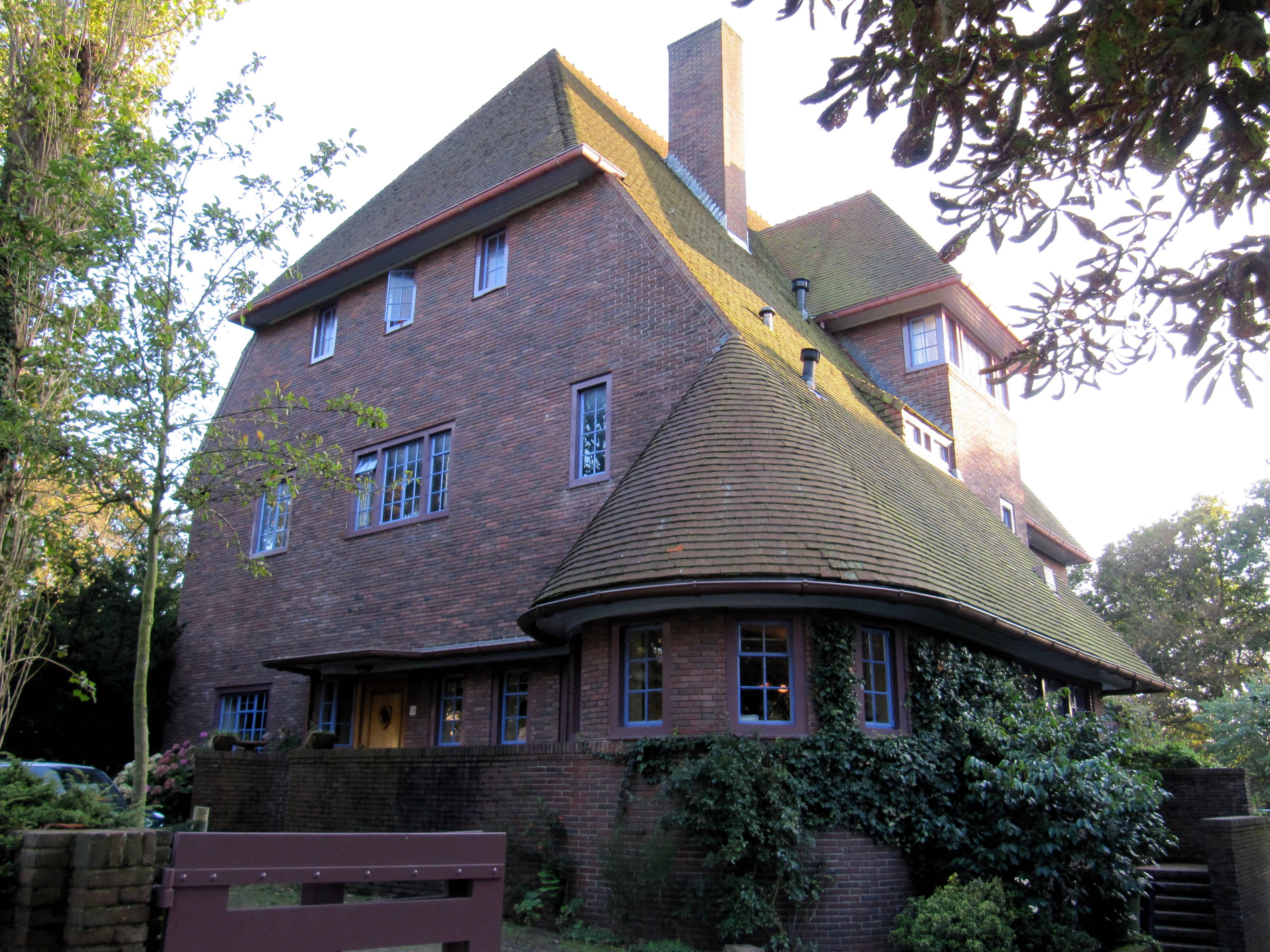 Den Haag Nieuwe Parklaan60 Het Weide Huis - Vrijstaande villa uit 1928, ontworpen door architect D. Roosenburg in opdracht van de familie Van Wulffen-Palthe. De villa is gebouwd in Engelse landhuisstijl met invloeden van de Nieuwe Haagse School en genaamd Het Weide Huis.